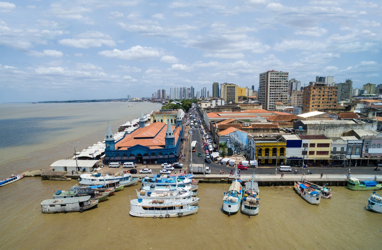 Imagem área do Porto de Belém no Pará.